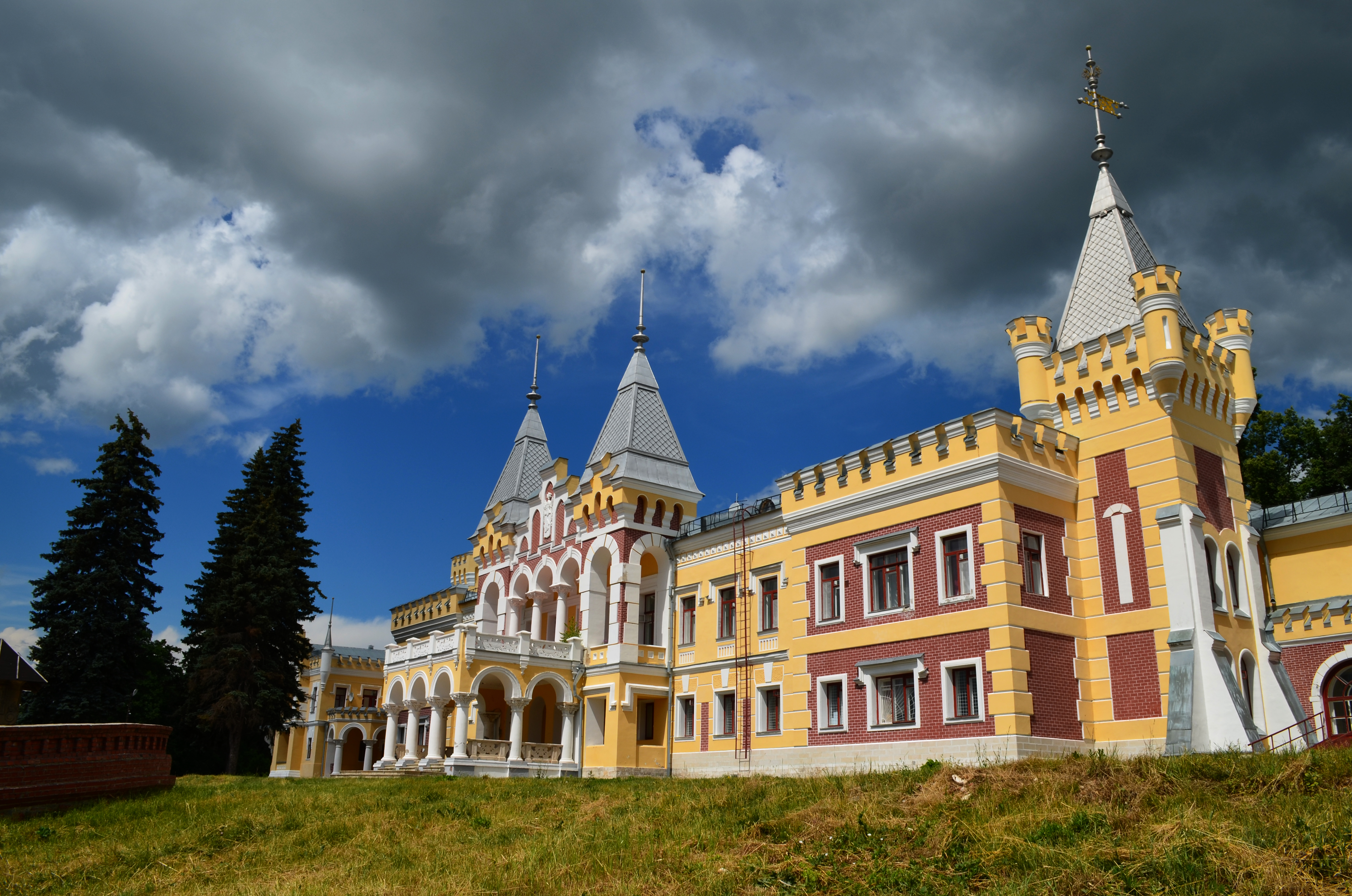 Усадьба С.П.Фон Дервиза в селе Кирицы Рязанской области.1883-1889.арх.Ф.Шехтель.